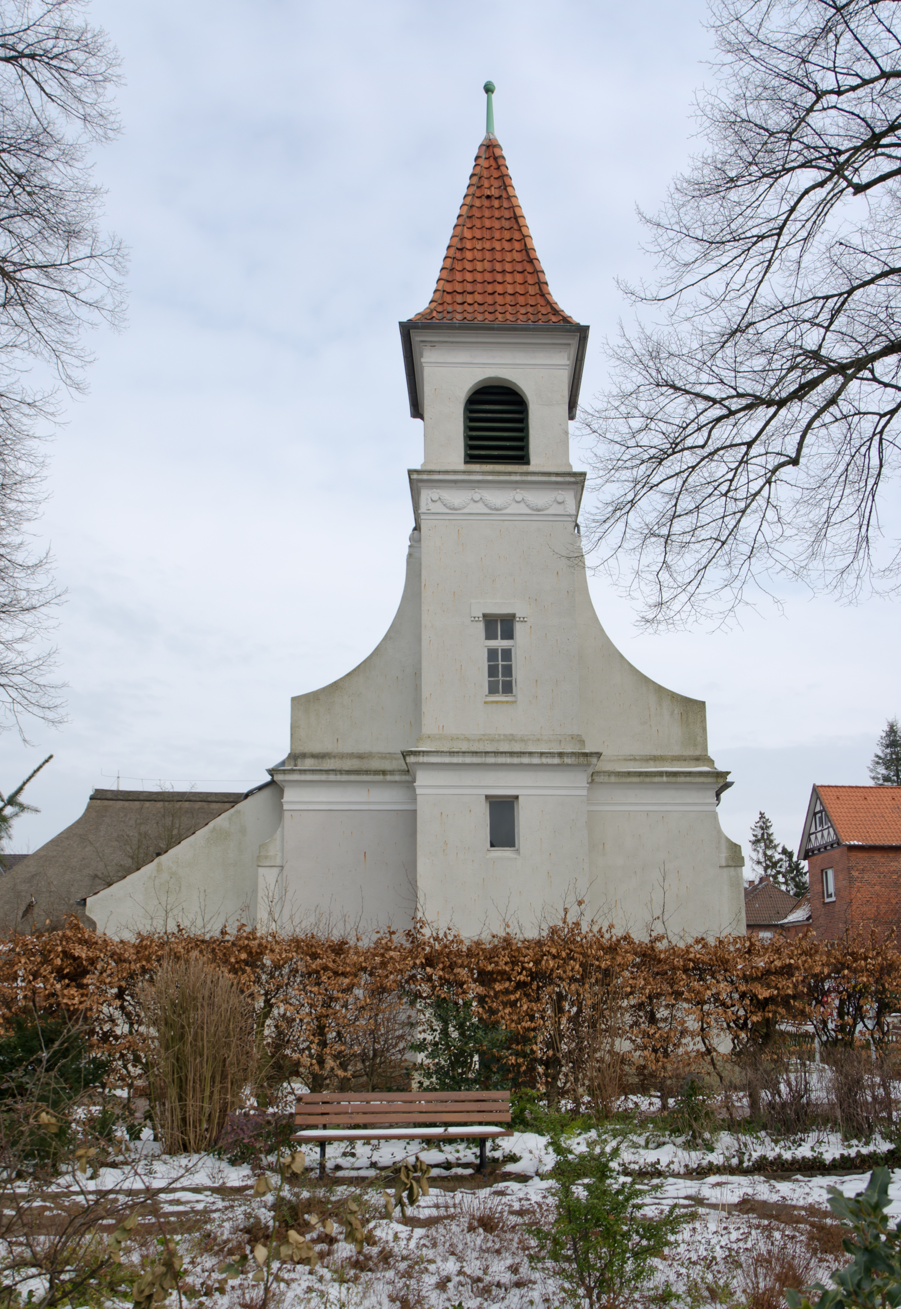 Winsen St Georgkapelle